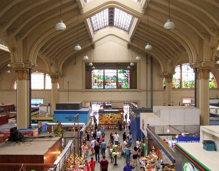 Mercado Municipal Paulistano, vista interna. São Paulo, Brasil.